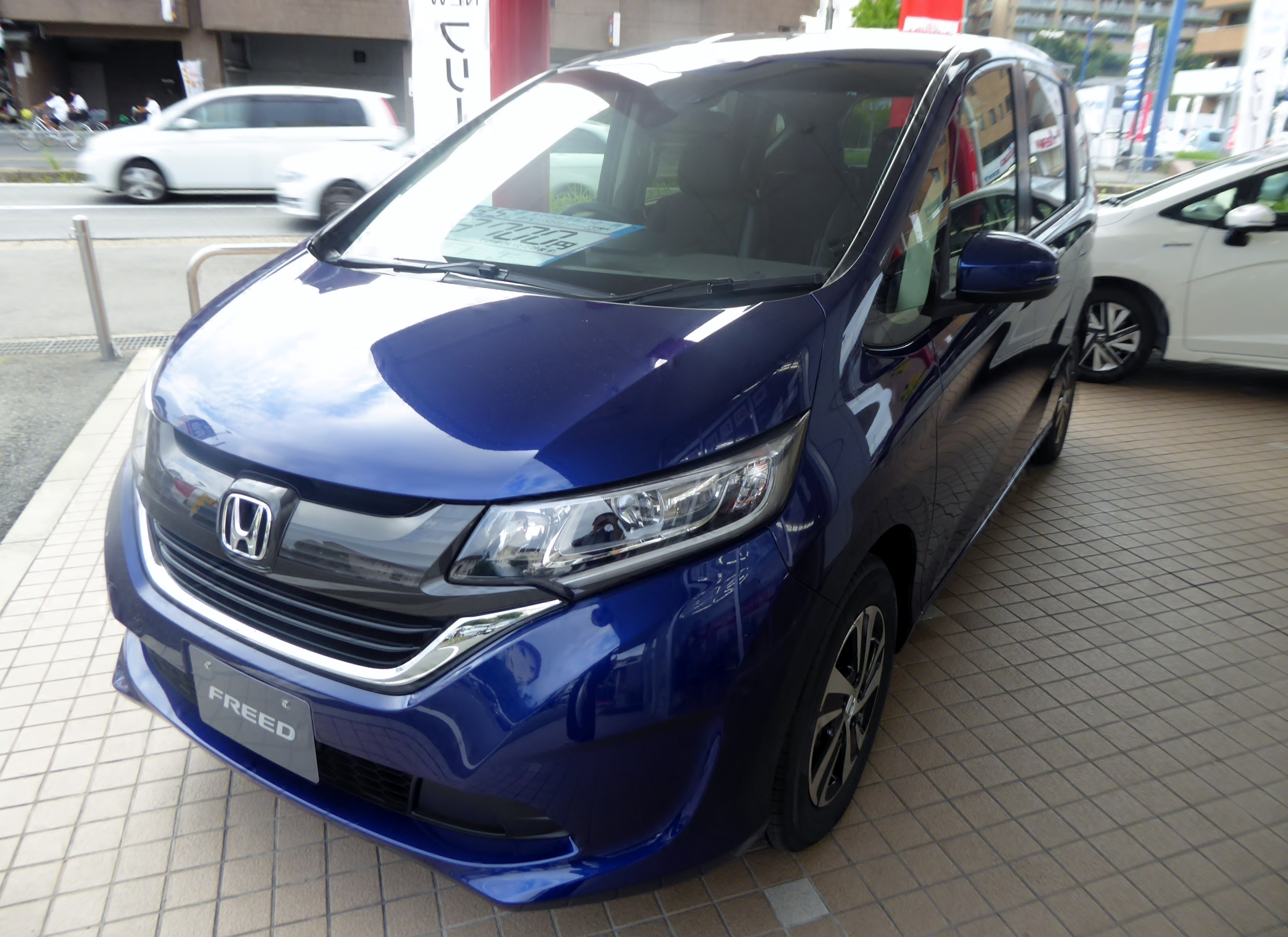 DAA-GB7型ホンダ・フリードハイブリッドEXをフロントから撮影。